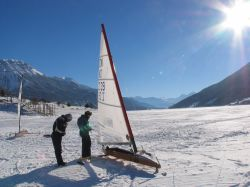 Eissegeln